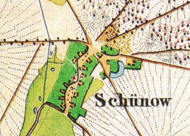 Schünow auf dem Urmesstischblatt, 1:25000, Blatt Trebbin (Nr.3745) von 1840, Schünow, Ortsteil von Zossen, Brandenburg, Deutschland